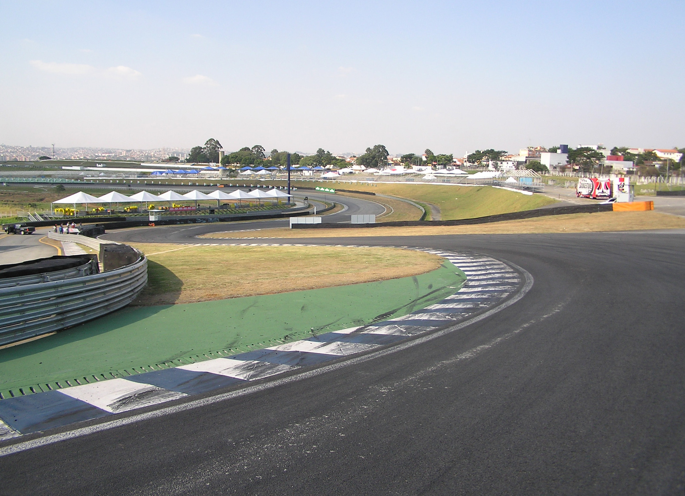 Autódromo José Carlos Pace: 'S' do Senna